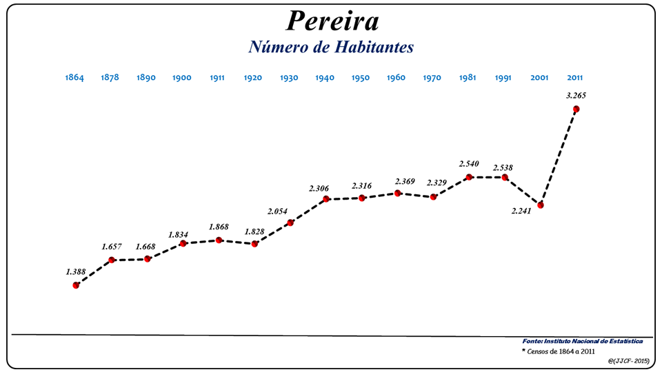 População